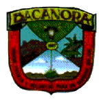 Escudo del municipio sonorense.